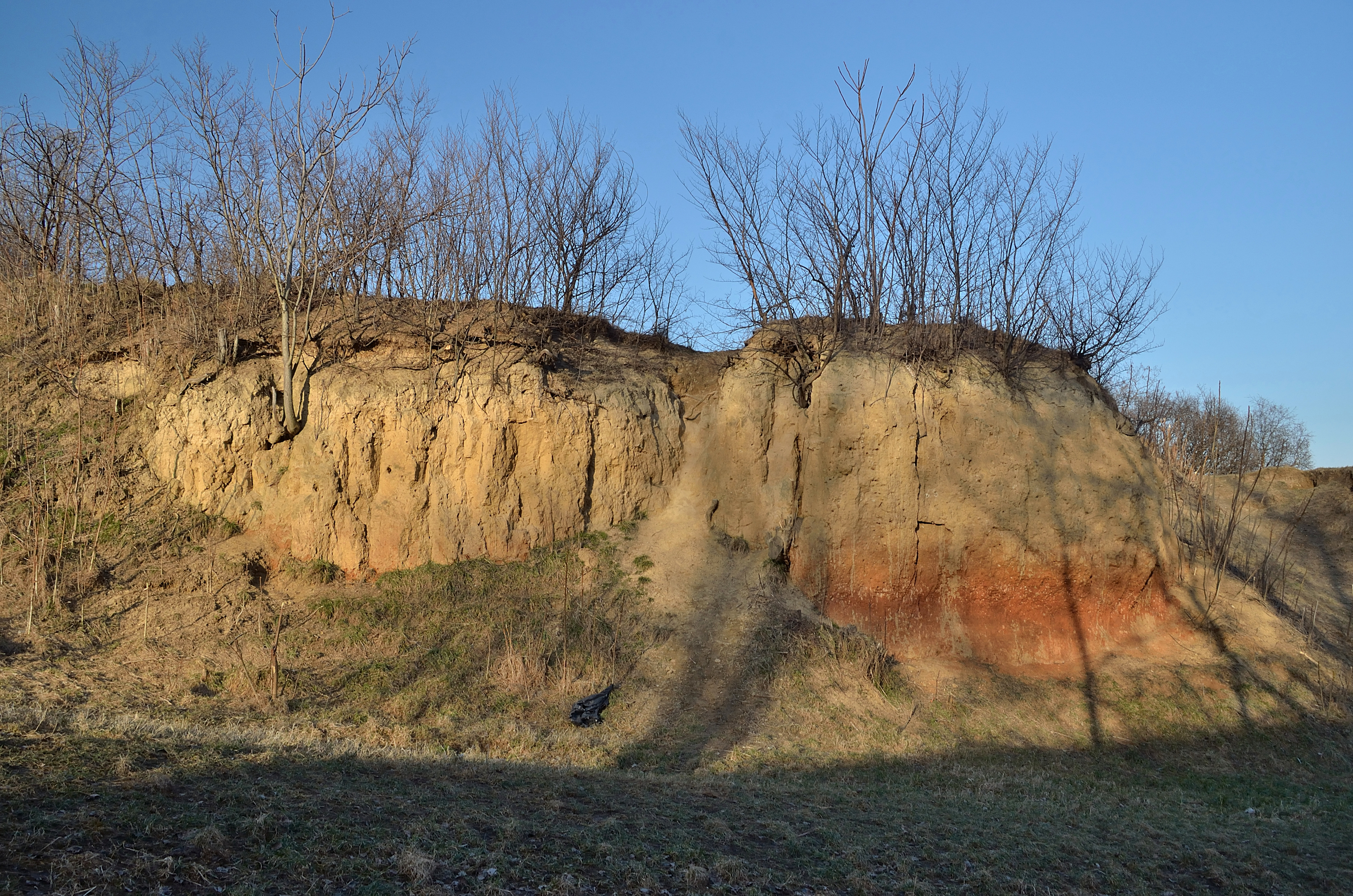 Abbauwand der ehemaligen Rudolfziegelöfen, Löwygrube, Laaer Berg. This media shows the natural monument in Vienna with the ID 704.